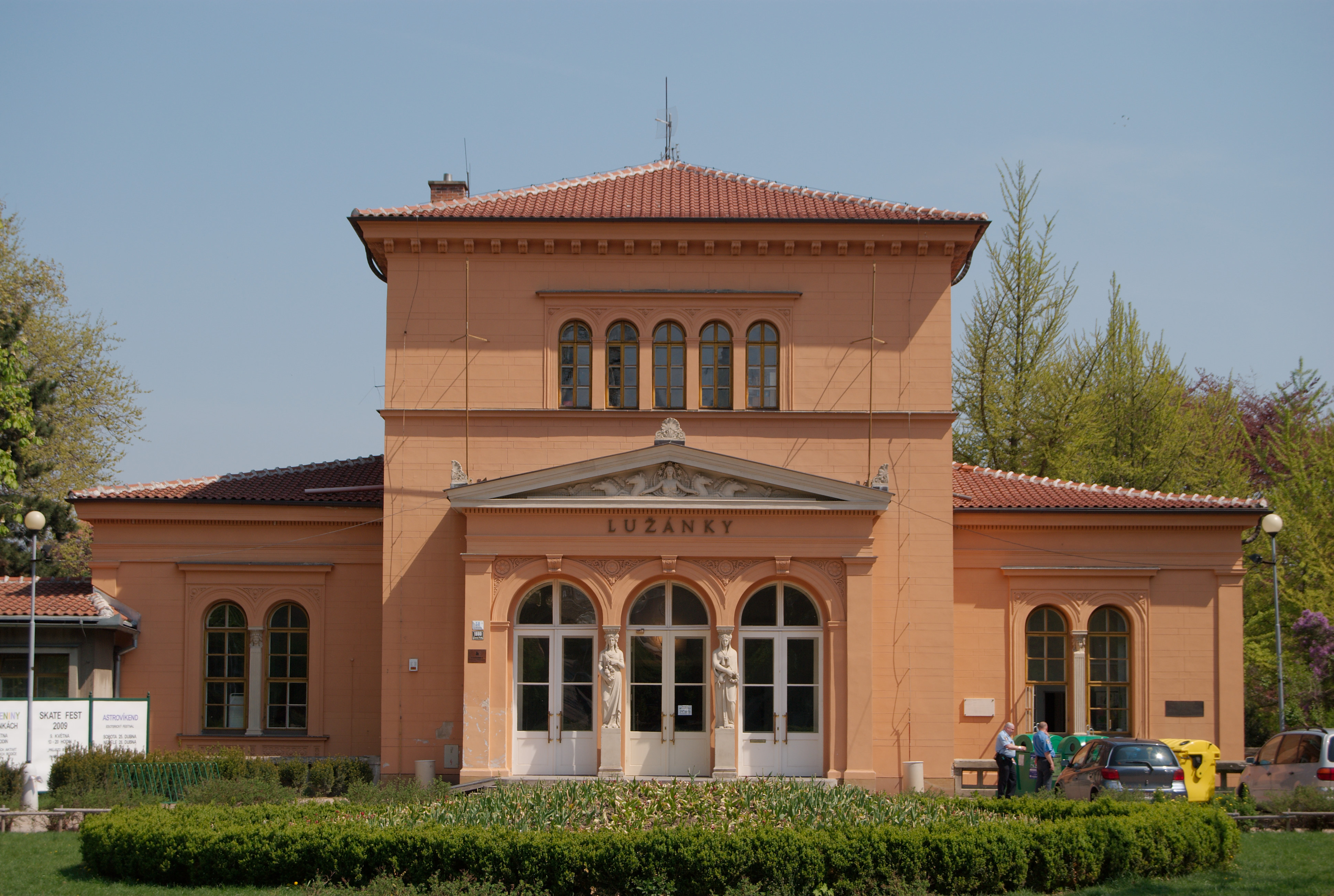 Pavilon v brněnském parku Lužánky